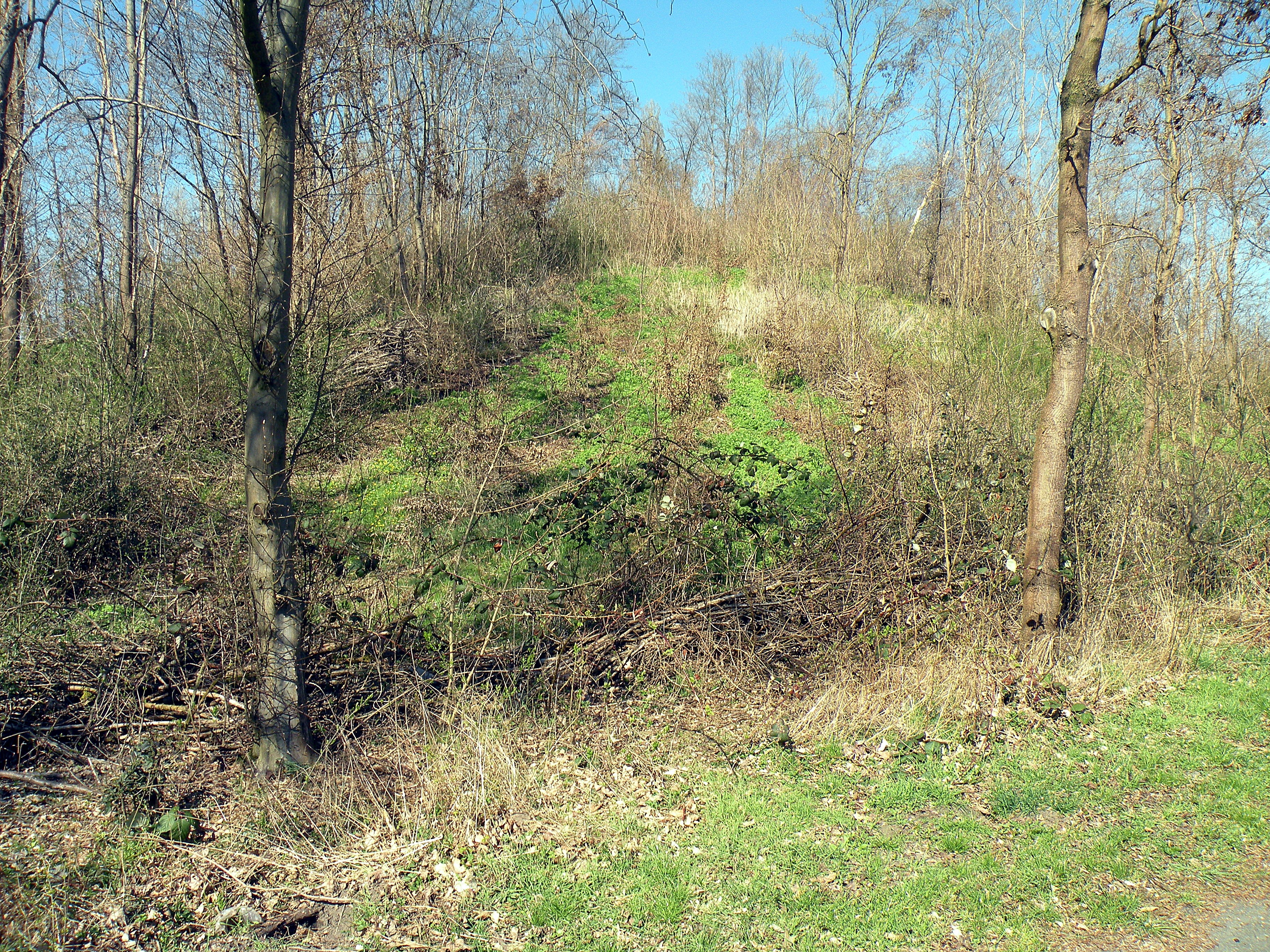 Зильбербук. Вершина весной